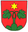 Blazono de Wartaŭ, elektodistrikto Werdenberg, Kantono Sankt-Galo, Svislando